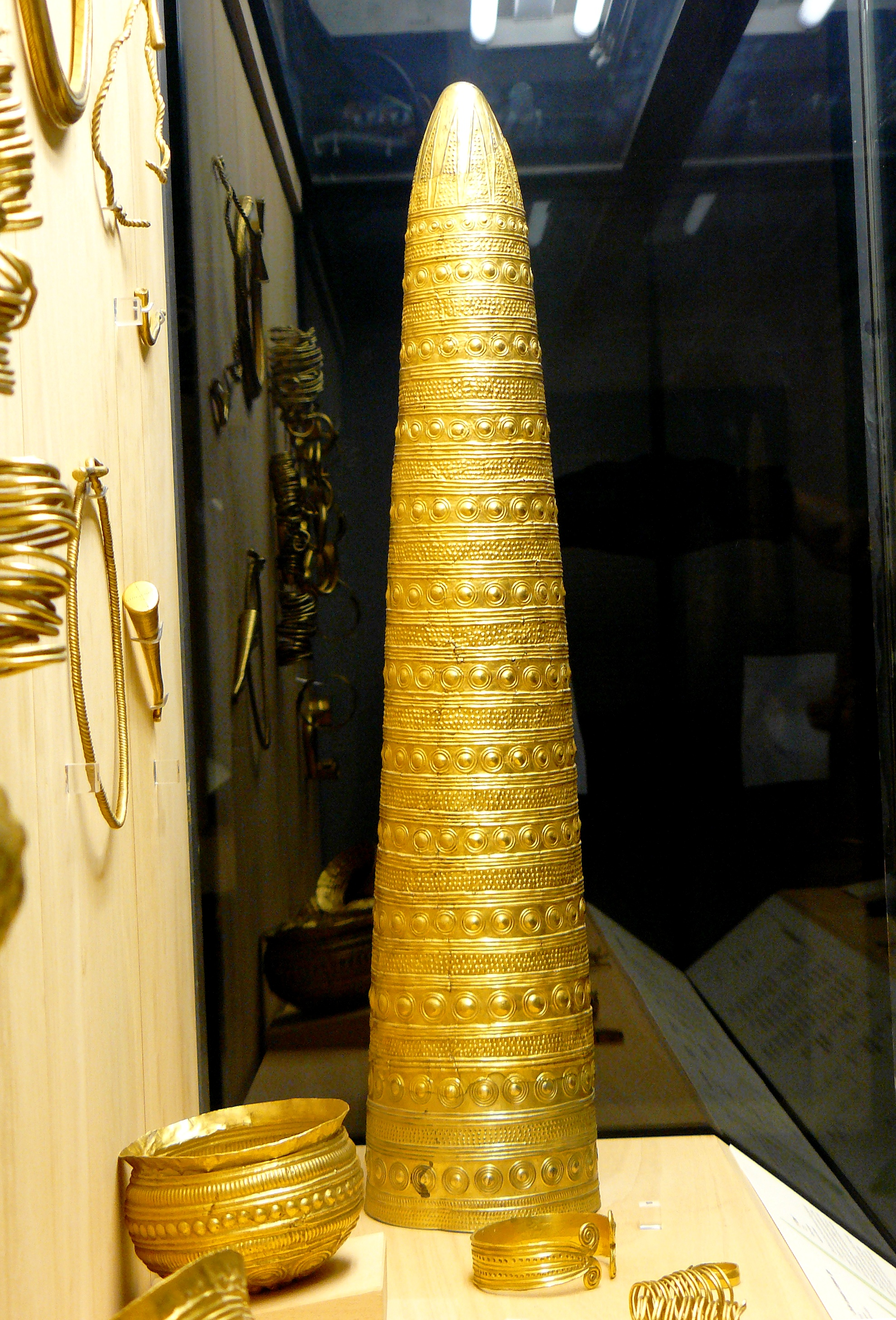 Cône d'or trouvé à Avanton (Vienne -France) en 1844 - Ornement (chapeau) de l'époque du Bronze moyen (vers 1000 av. J.C.) - Hauteur 55 cm - Poids 321 gr - Musée d'archéologie nationale de Saint-Germain-en-Laye.